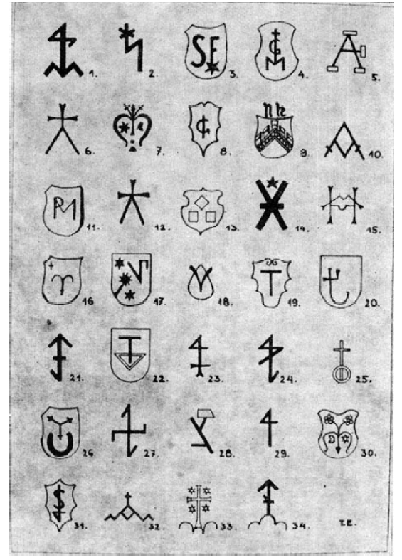 A mesterjegyek táblázata. Hungarian merchant marks.